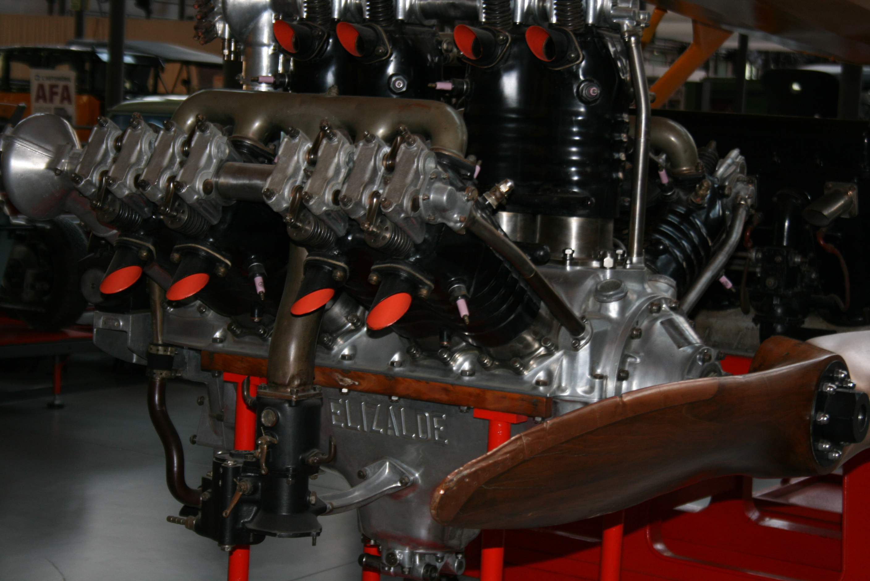 Motor Elizalde, sota llicencia Lorraine, Tipus A. Exposat en el Museu de la Ciencia i la Tècnologia